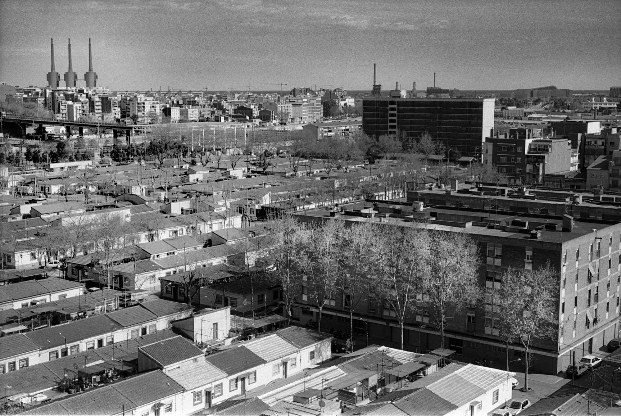 Les cases barates de Bon Pastor des d'adalt. Al fons la tèrmica de Sant Adrià de Besos